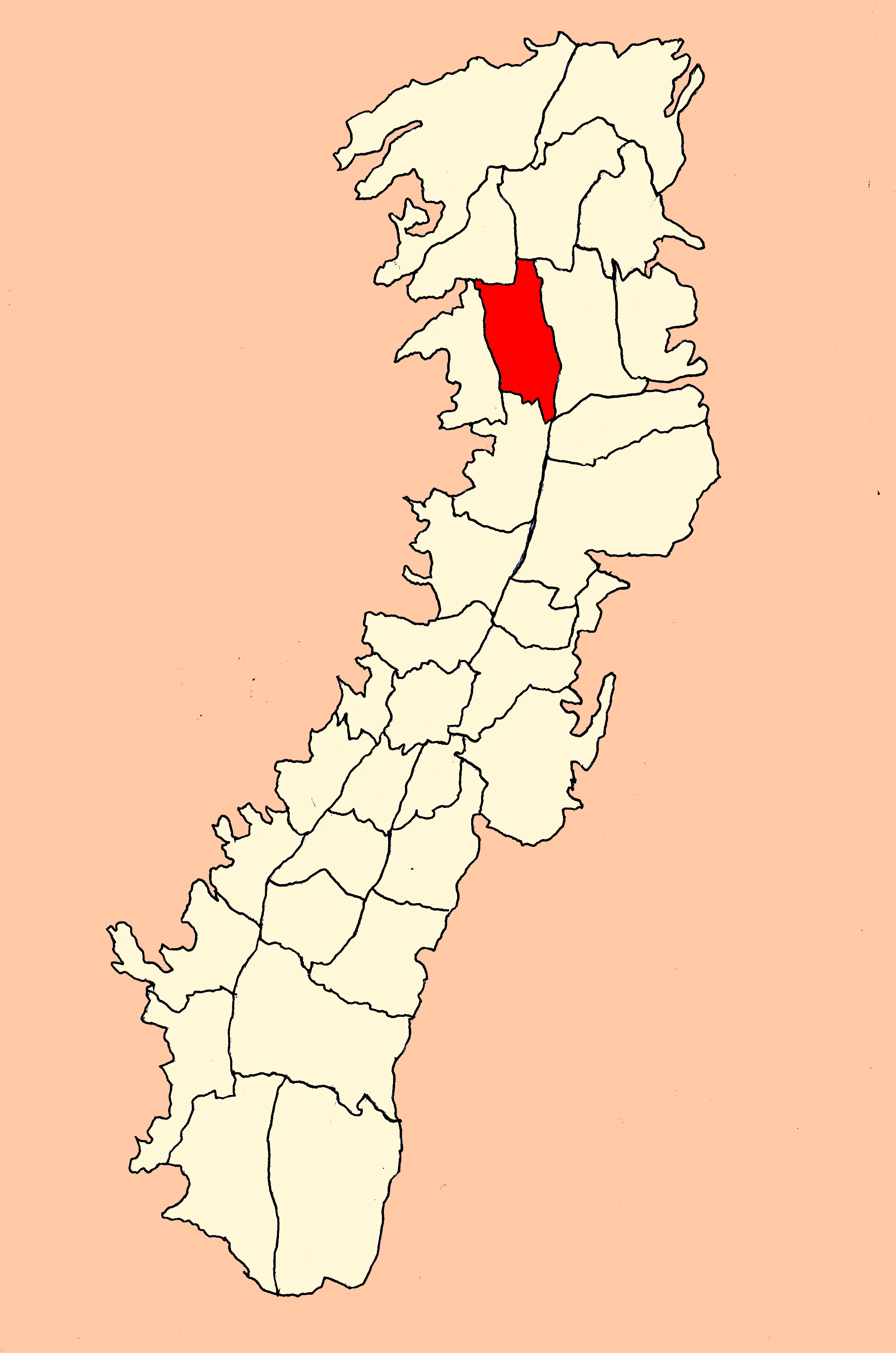 Parroquia Concepción (Quito, Ecuador)